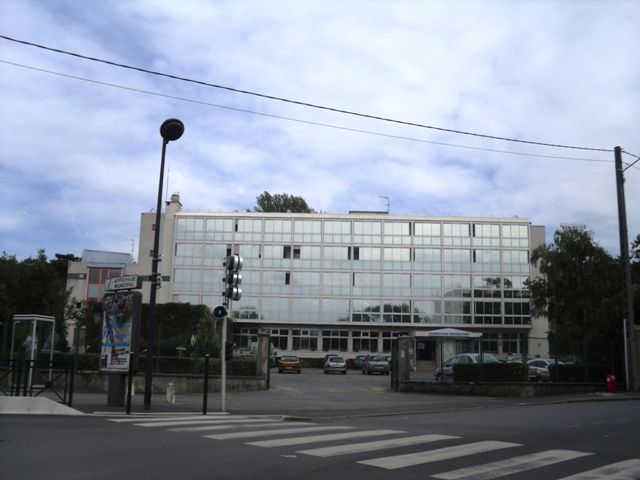 La maison de retraite du cinéma et du spectacle à Vigneux-sur-Seine (91)